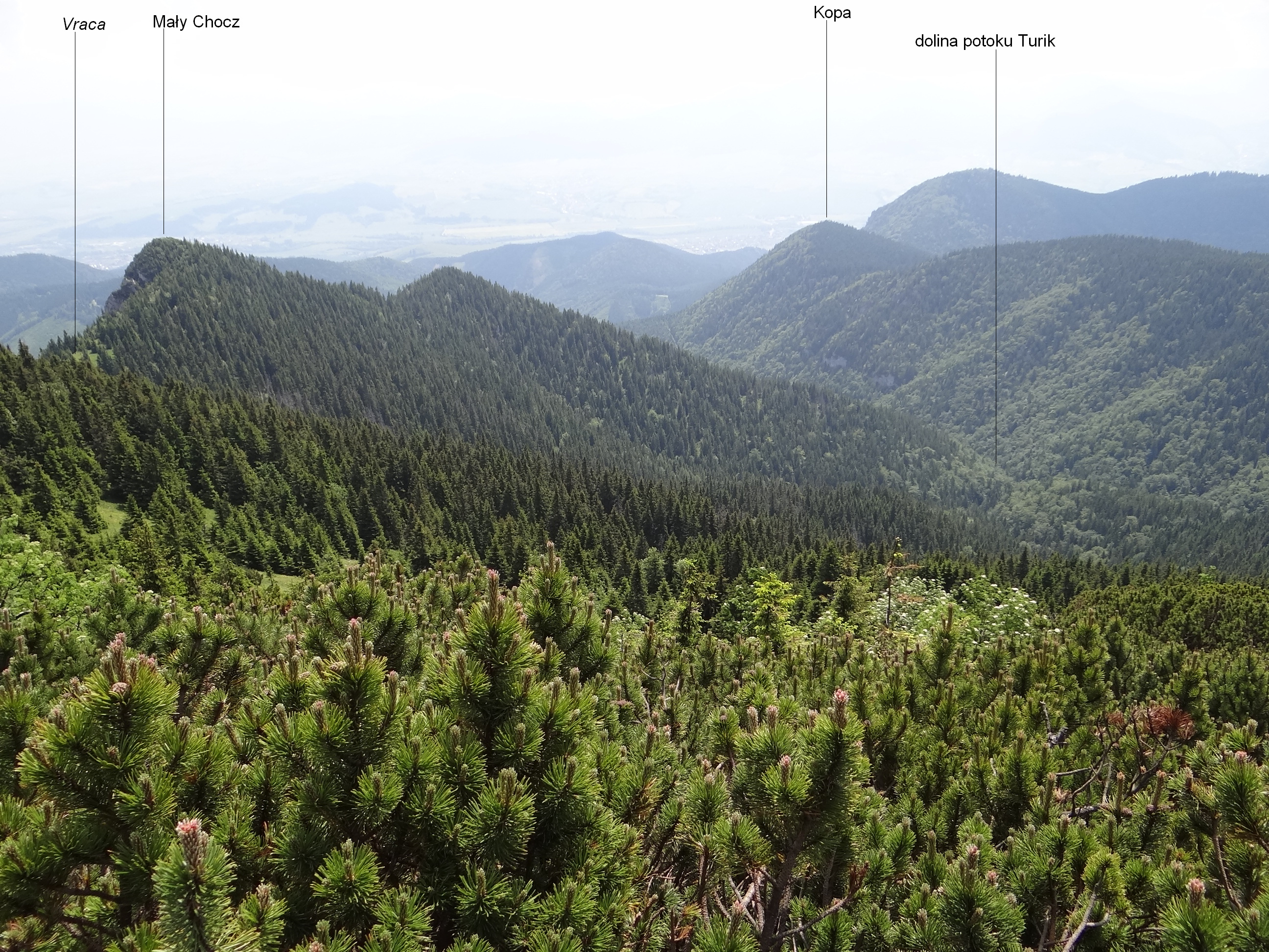 Widok z Wielkiego Chocza